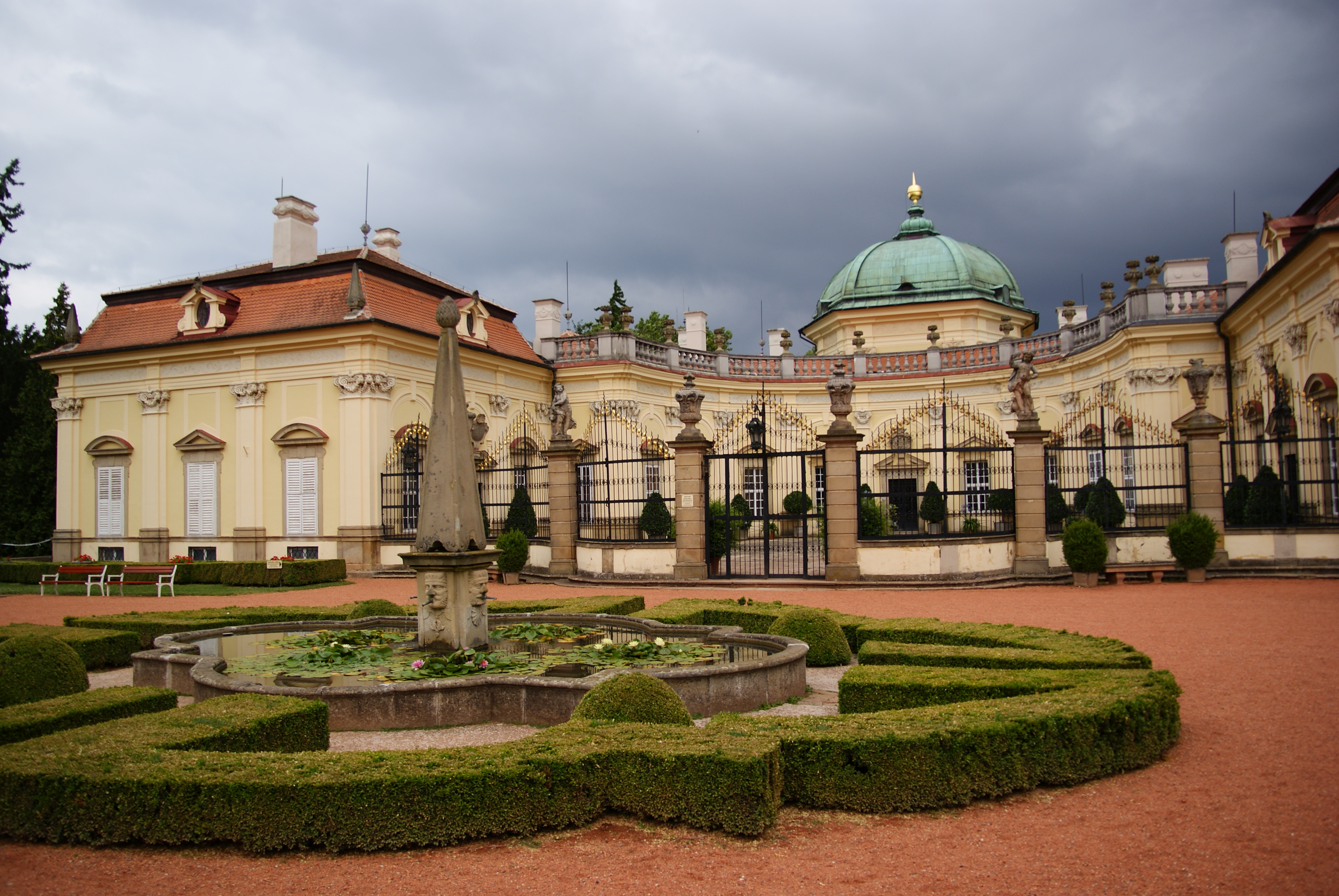 Zámek Buchlovice Buchlovice, Buchlovice 12